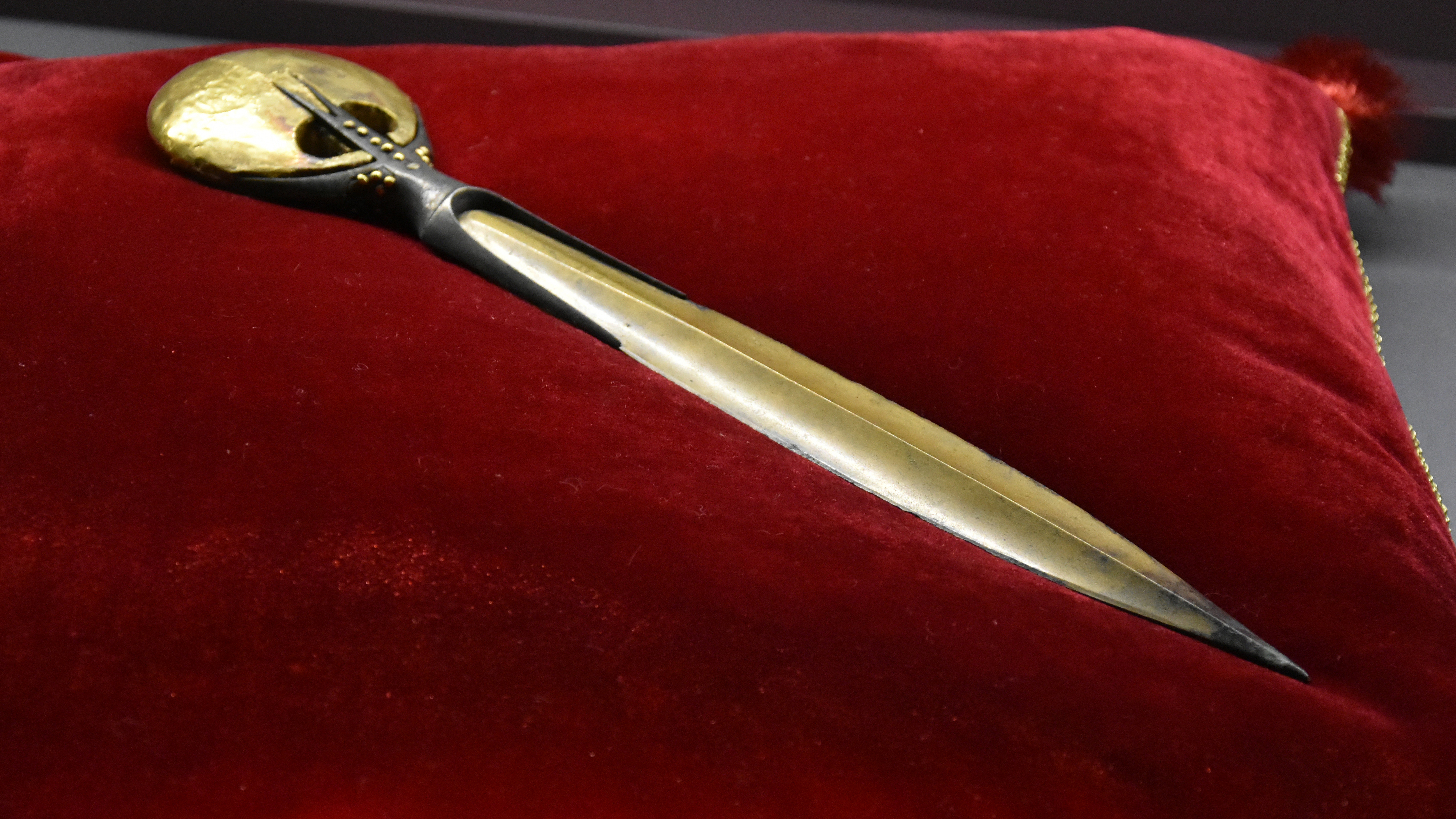 ceremoniële dolk (hout, koper en goud, 23 cm lang) van farao Kamosis (ca.1540 v.C;) die de egyptoloog Auguste Mariette (1821-1881) heeft opgedolven. This is a file created at the museum: Royal Library of Belgium in Brussels